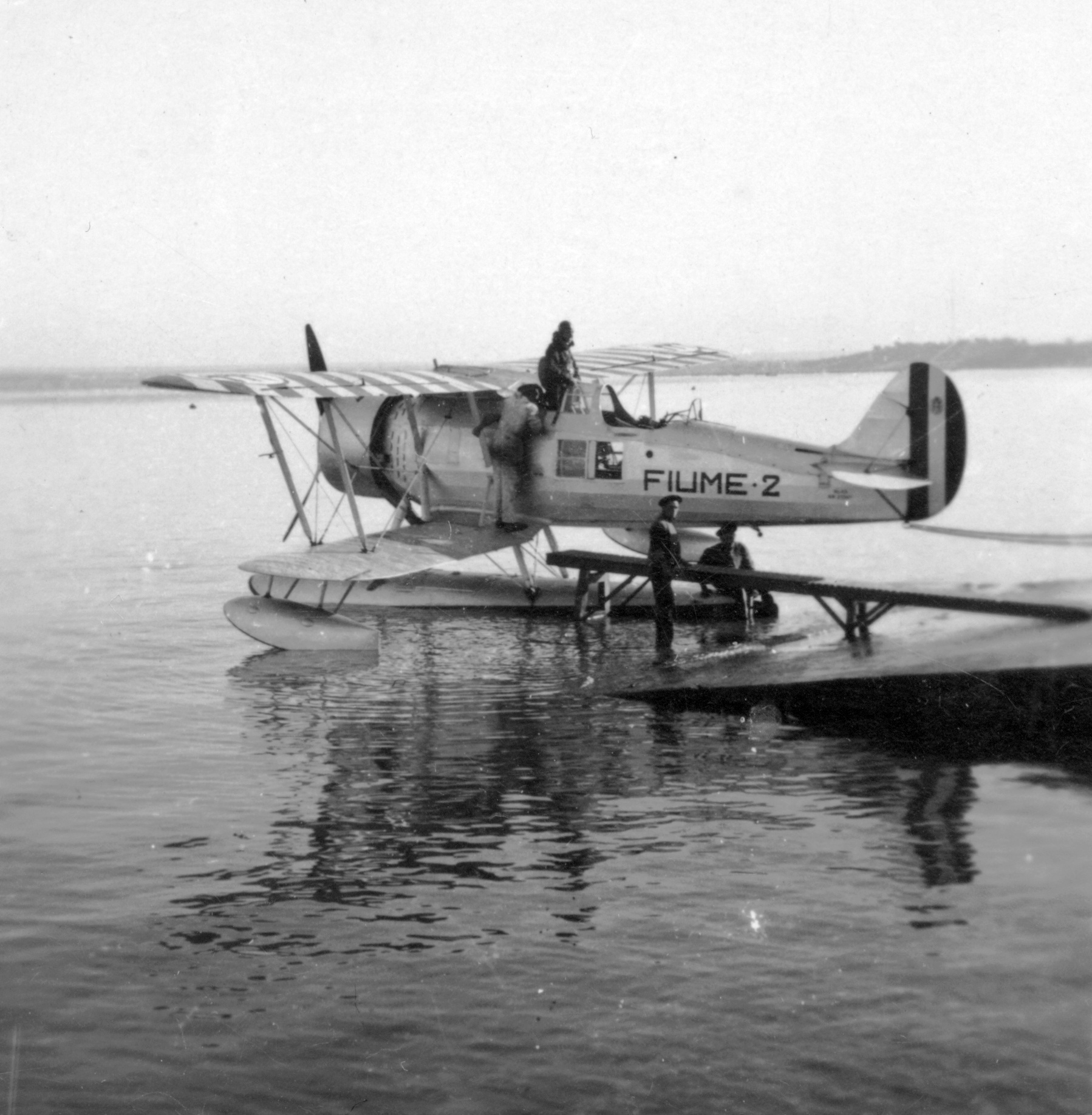 Az Olasz Haditengerészet Romeo Ro-43 típusú felderítő hidroplánja. Tags: Italian brand, IMAM brand, hydroplane, airplane Title: Az Olasz Haditengerészet Romeo Ro-43 típusú felderítő hidroplánja.